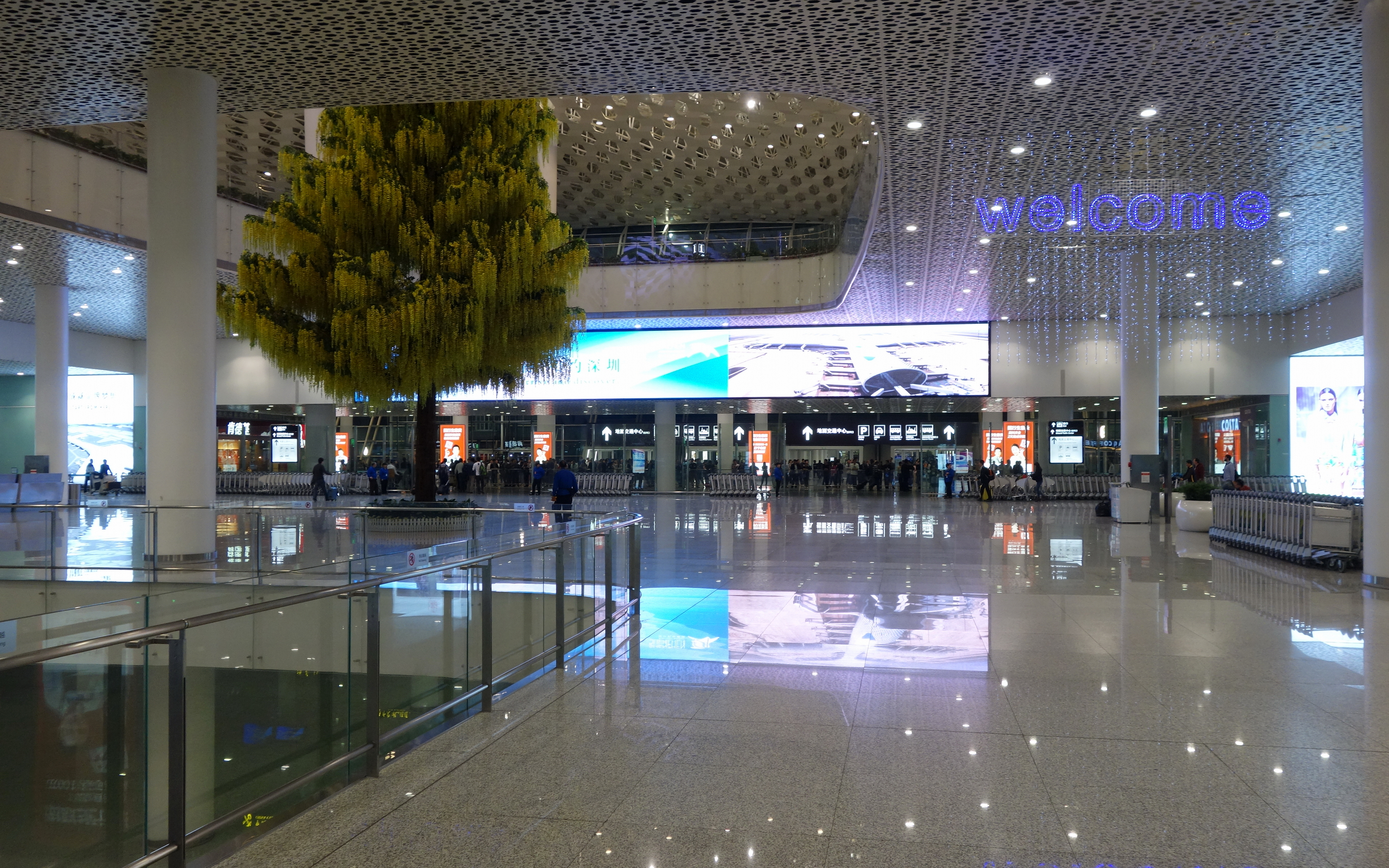 深圳宝安国际机场新航站楼到达大厅